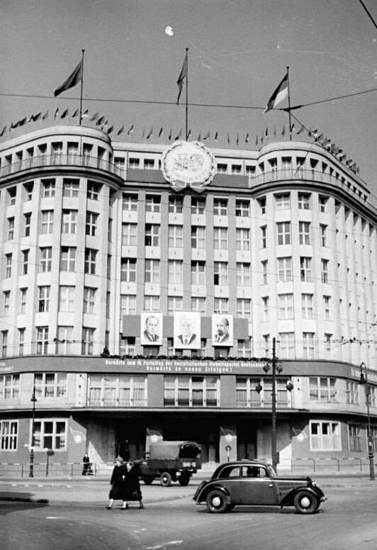 Berlin, Haus des ZK der SED ADN-ZB Weiß RS-Hö 24.3.1954 Das Haus des Zentralkomitees der Sozialistischen Einheitspartei Deutschlands in Berlin ist für den IV. Parteitag festlich geschmückt [Berlin, Torstraße Ecke Prenzlauer Allee.- Gebäude Zentralkomitee (ZK) der Sozialistischen Einheitspartei Deutschlands (SED)]